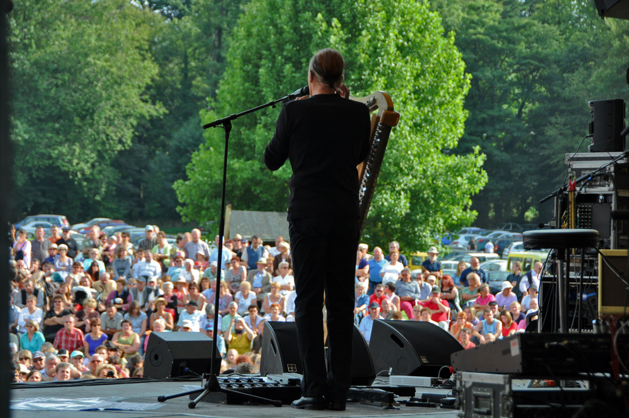 Alan Stivell en concert à Gourin lors du Championnat des sonneurs le 5 septembre 2010.